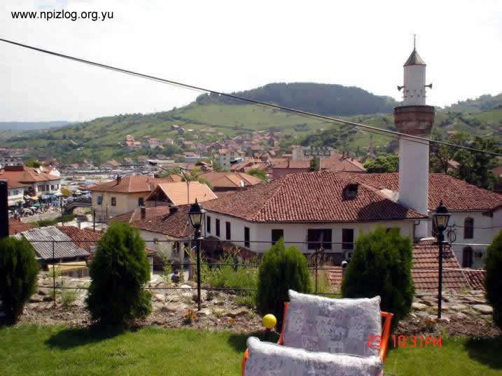 Arap dzamija u Novom Pazaru